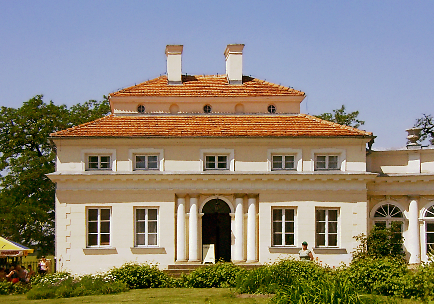 Śmiełów, oficyna pałacowa